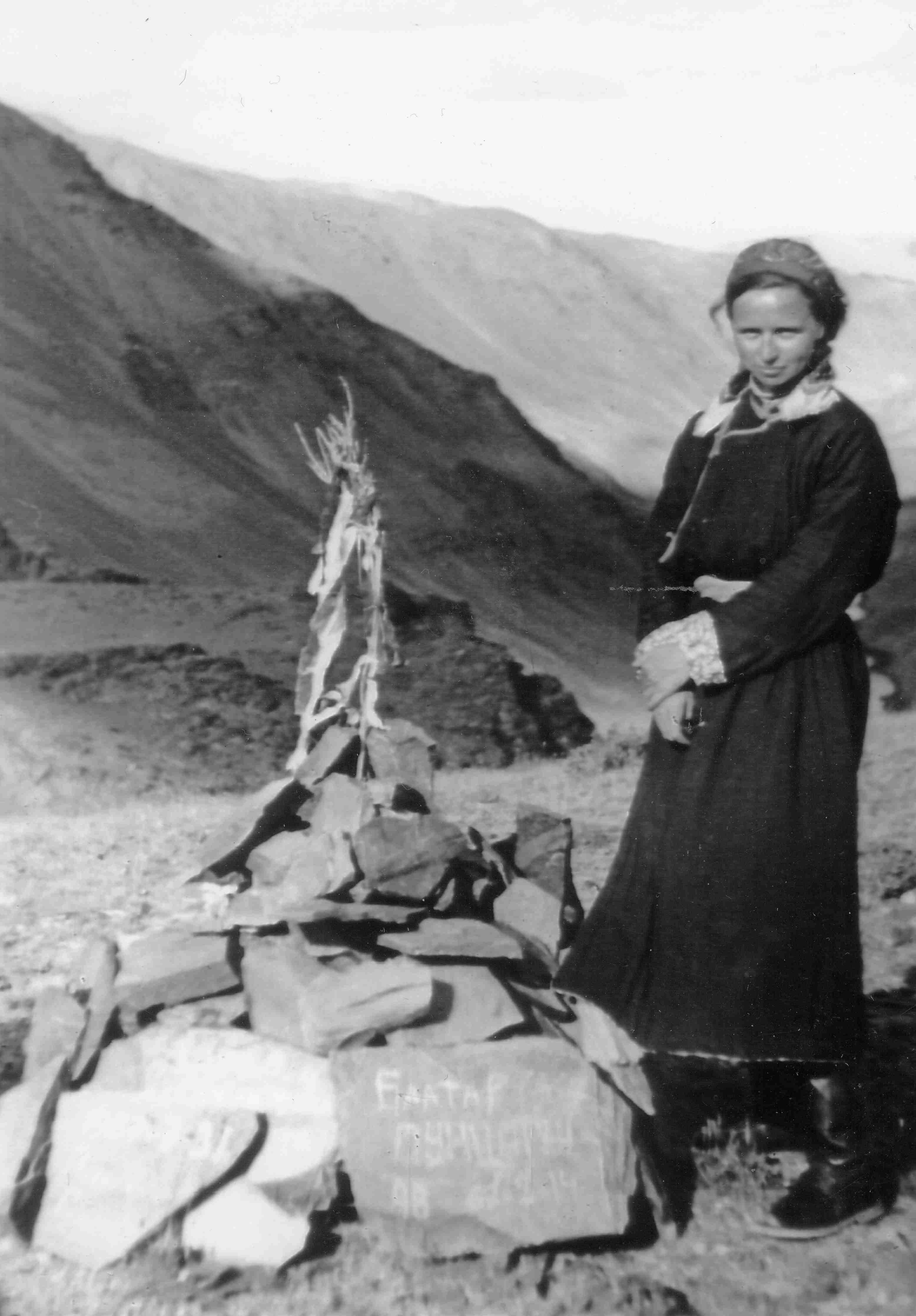 Erika Taube, Mongolei, Altai, 1963